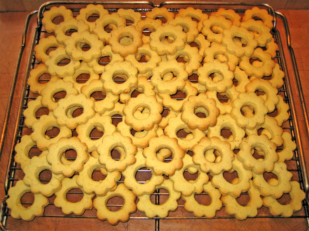 Canestrelli alla nocciola. ricetta/recipe anche su